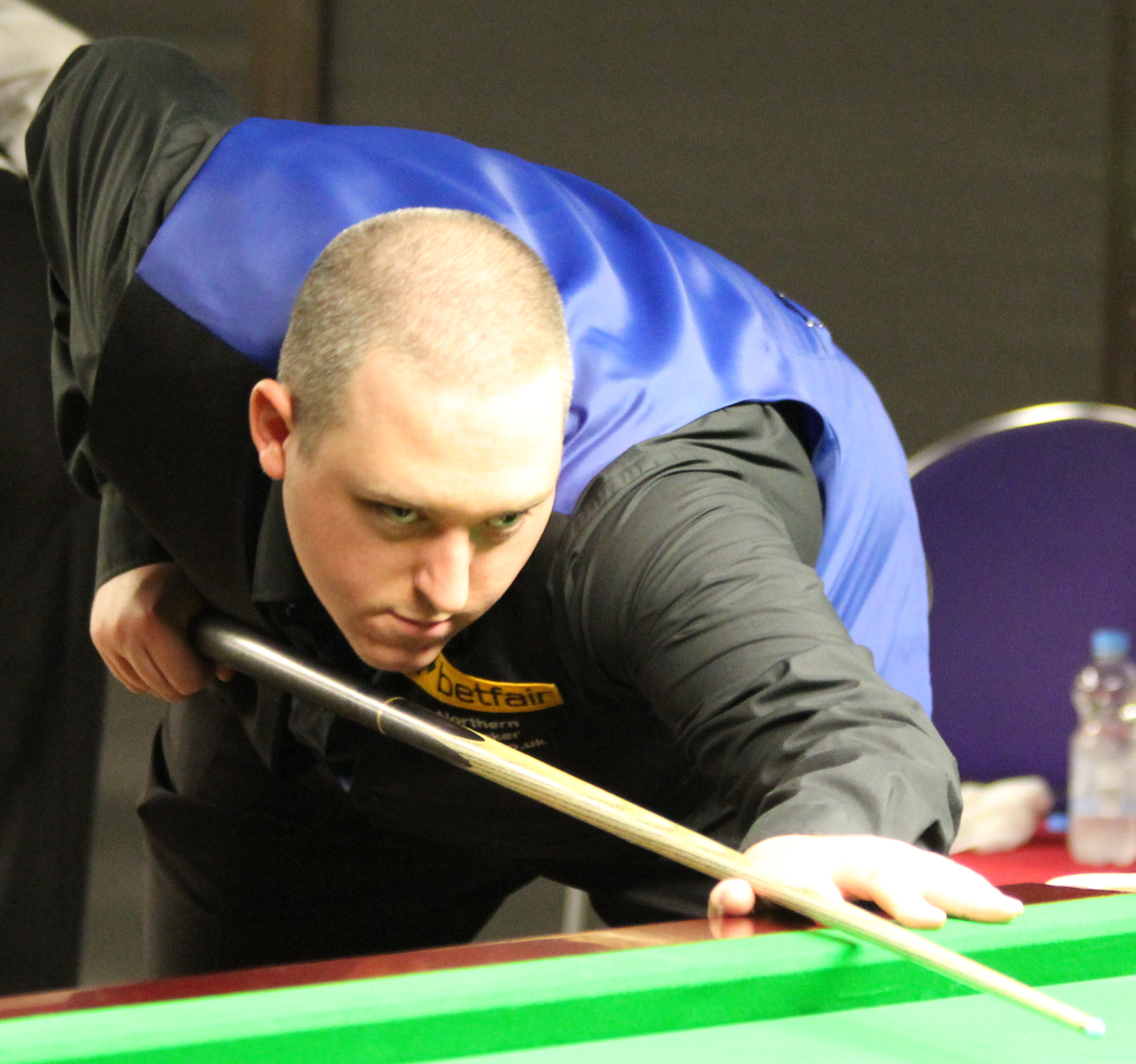 David Grace beim Paul Hunter Classic 2012